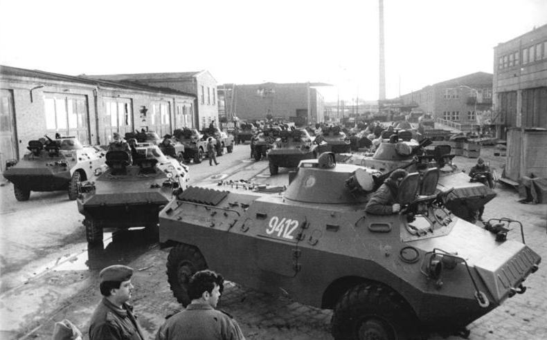 ADN-ZB Bartocha 5.2.89- Neubrandenburg: Verschrottung - Einhundert Schützenpanzerwagen aus dem Truppenteil "Hans Coppi" der Grenztruppen der DDR erhielt das Reparaturwerk zum Verschrotten. 65 Fahrzeuge werden im Hauptbetrieb, die anderen im Betriebsteil Teterow zerlegt. Verwendbare Teile wie Optik und Rotoren erhält die Volkswirtschaft.